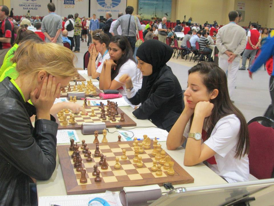 Une vue des 40es olympiades d'échecs tenues à Istambul